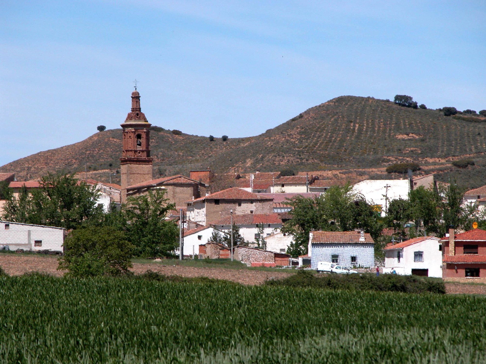 Pipaona, aldea de Ocón (La Rioja - España)